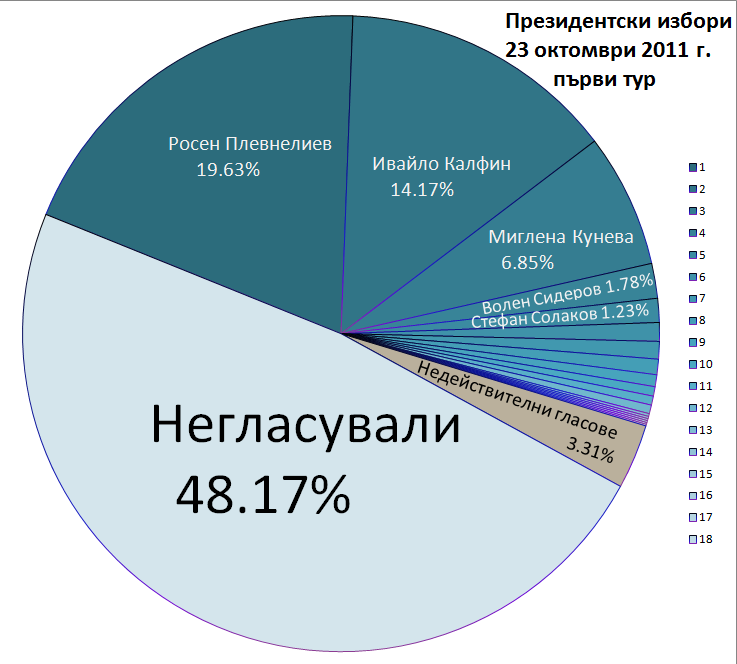 Президентски избори - първи тур на 23 октомври 2011 г. Изборни резултати